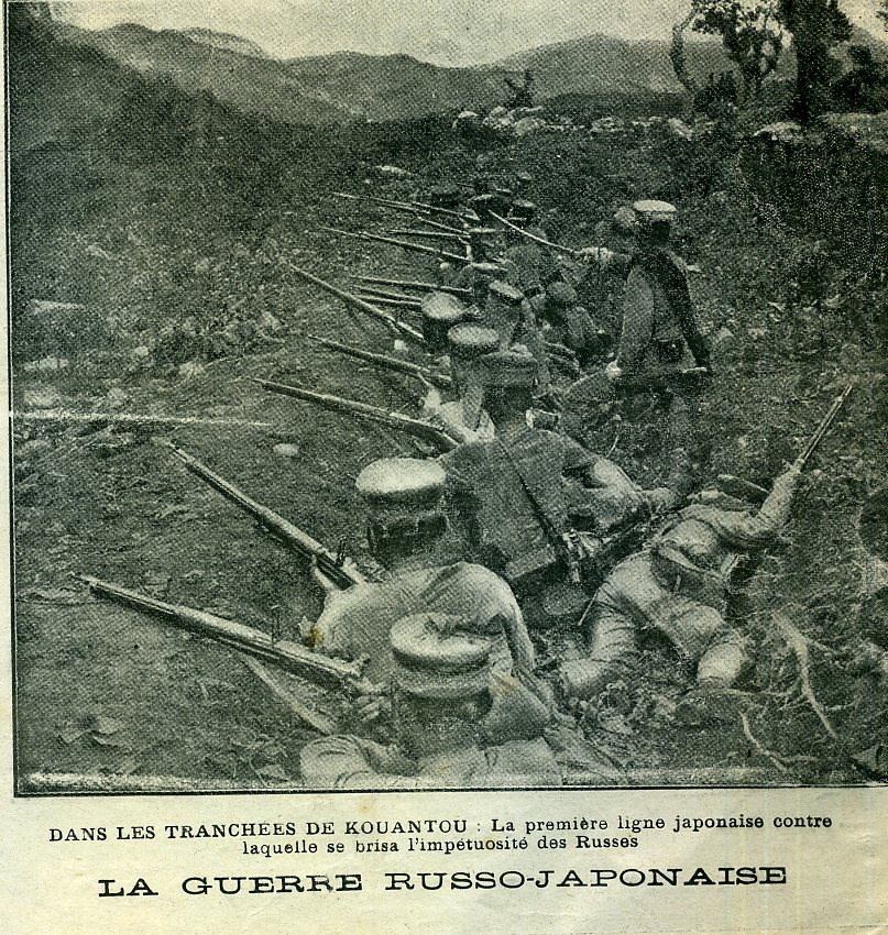 see picture